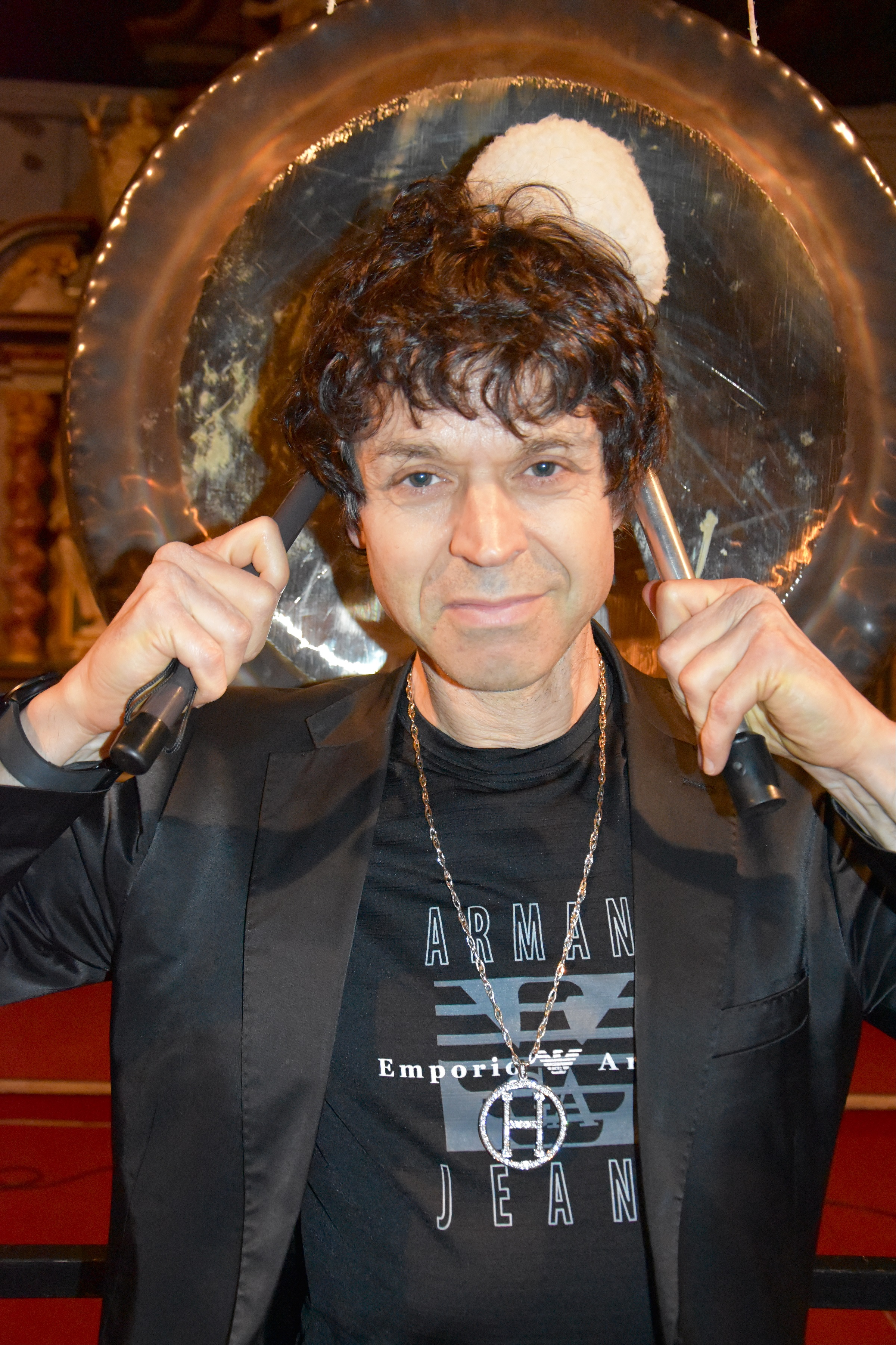 Peter Heeren beschäftigt sich mit Gongs und ihren Klangwirkungen.